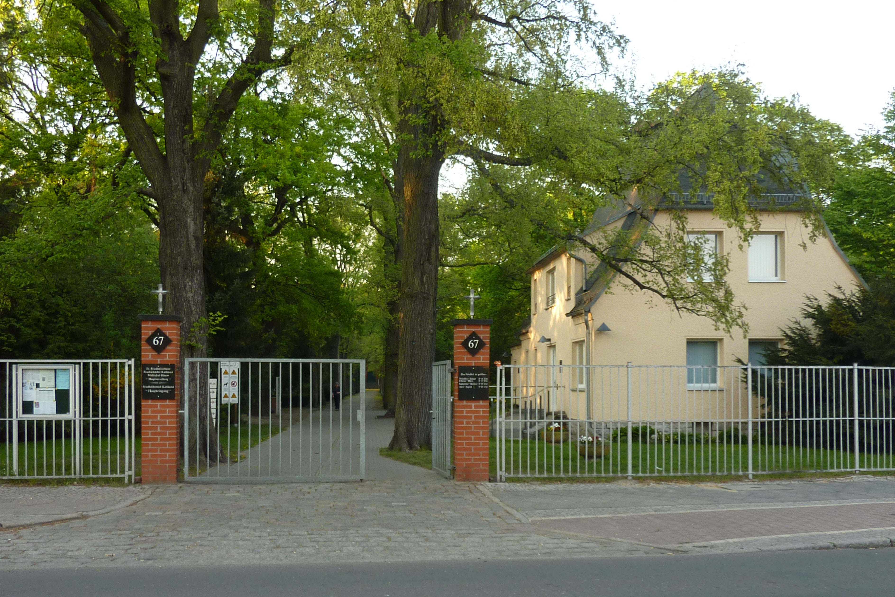 Eingang zum evangelischen Karlshorster und Neuen Friedrichsfelder Friedhof in der Robert-Siewert-Straße in Berlin-Karlshorst.